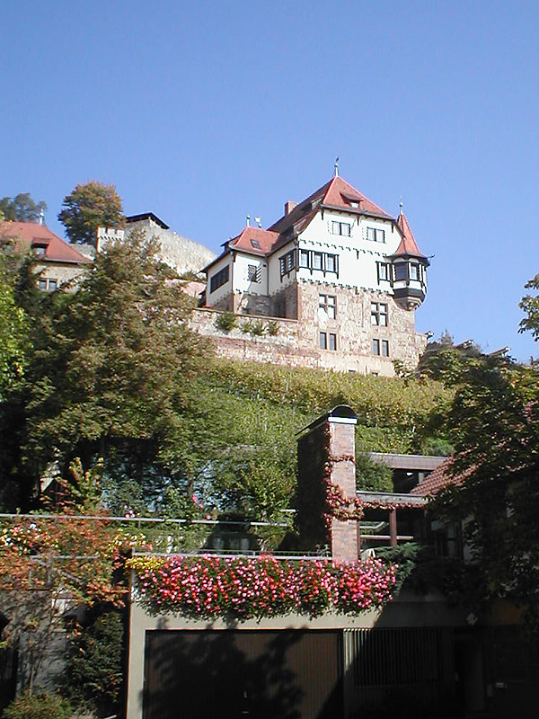 „Unteres Schloss“ in Beilstein, Baden-Württemberg, Deutschland